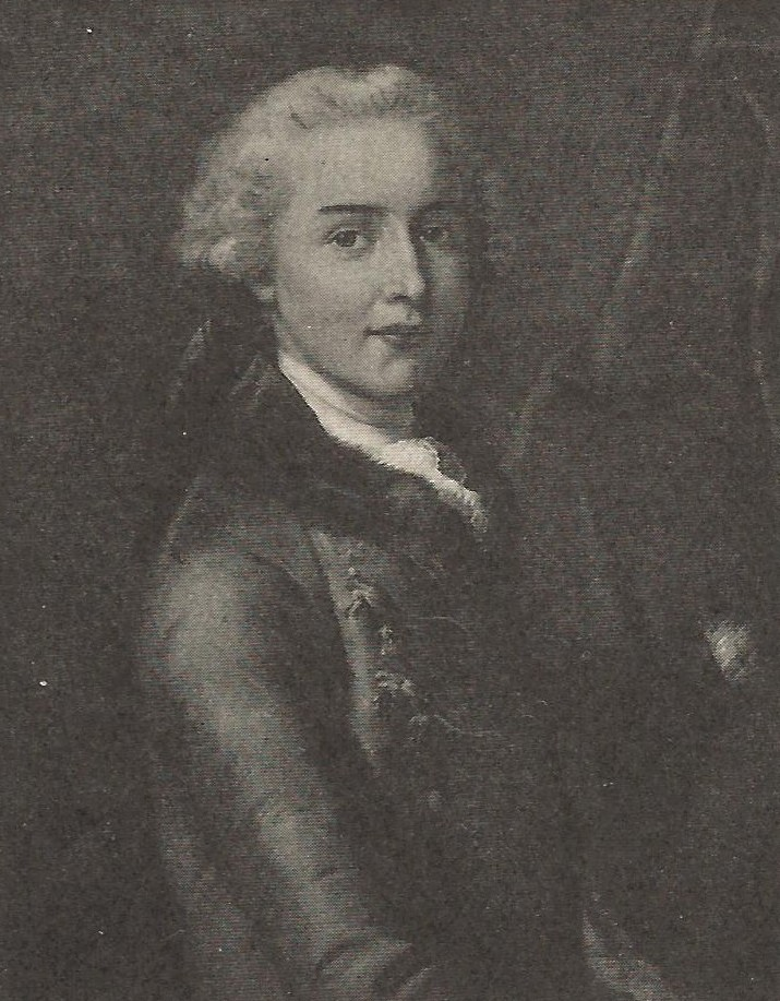 Bildnis Samuel Rudolf Frisching.